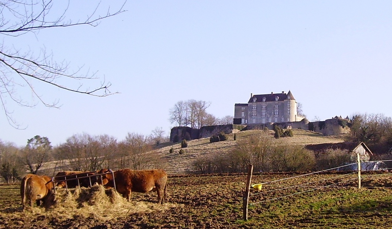 Château de Montréal, Dordogne, France. Vu du nord.